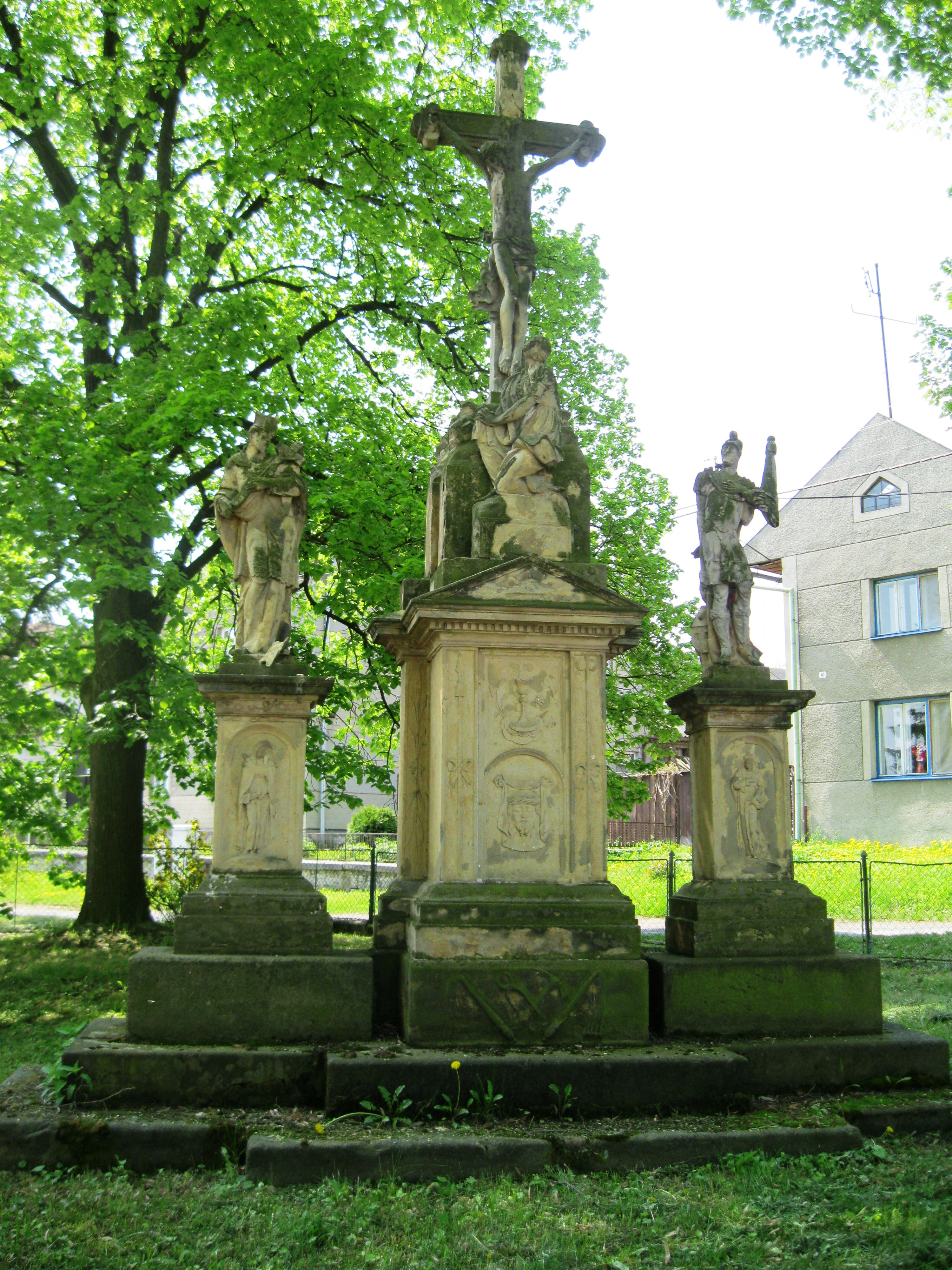 Sousoší Ukřižování (Řimice), nám., Řimice